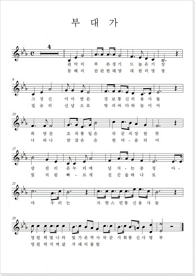 부대가